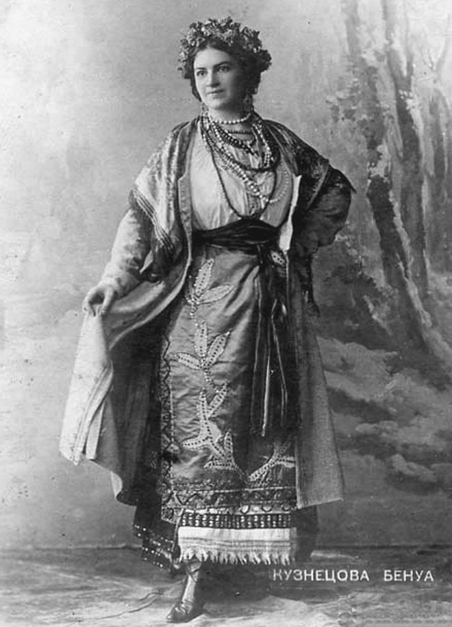 Maria Kuznetsova, opera singer, in Ukrainian Folk Costume.